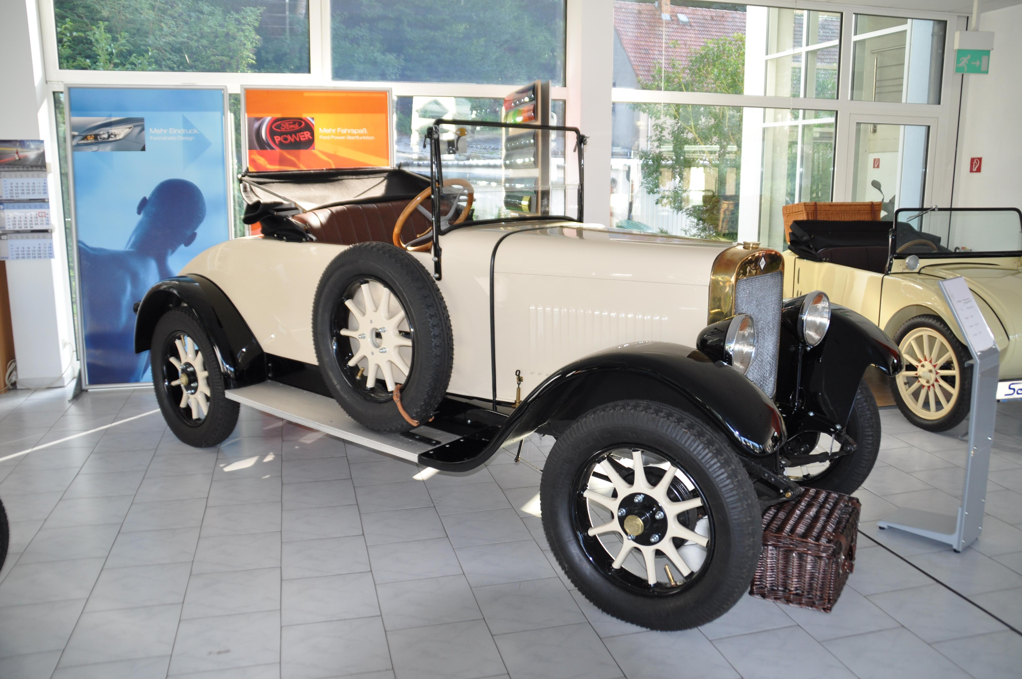 Pilot 6/30 PS, zweisitziges Cabriolet, Rechtslenker